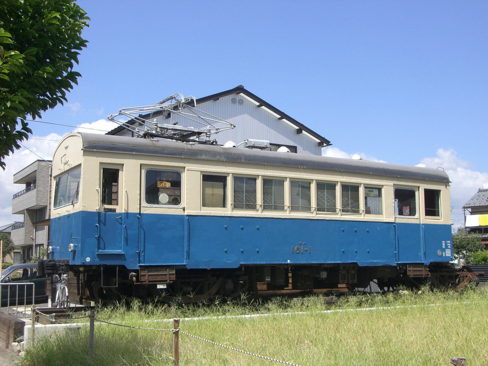 福井鉄道160形電車 161-1（福井鐡道 村国駅跡）